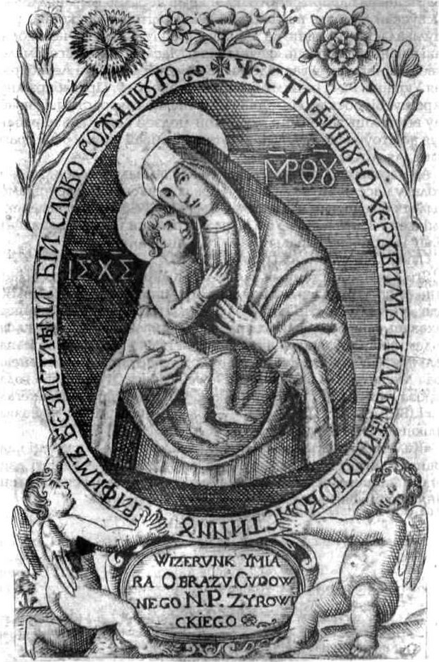 Беларуская (тарашкевіца): Абраз Маці Божай Жыровіцкай (Maci Božaja Žyrovickaja)